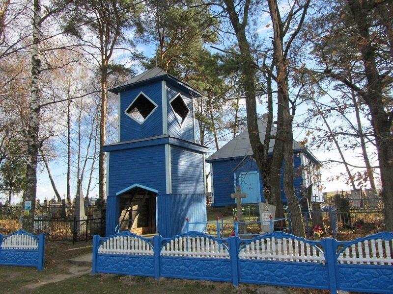 Межная Слабада. Царква ў гонар Адсячэння Главы Іаана Прадцечы са званіцай